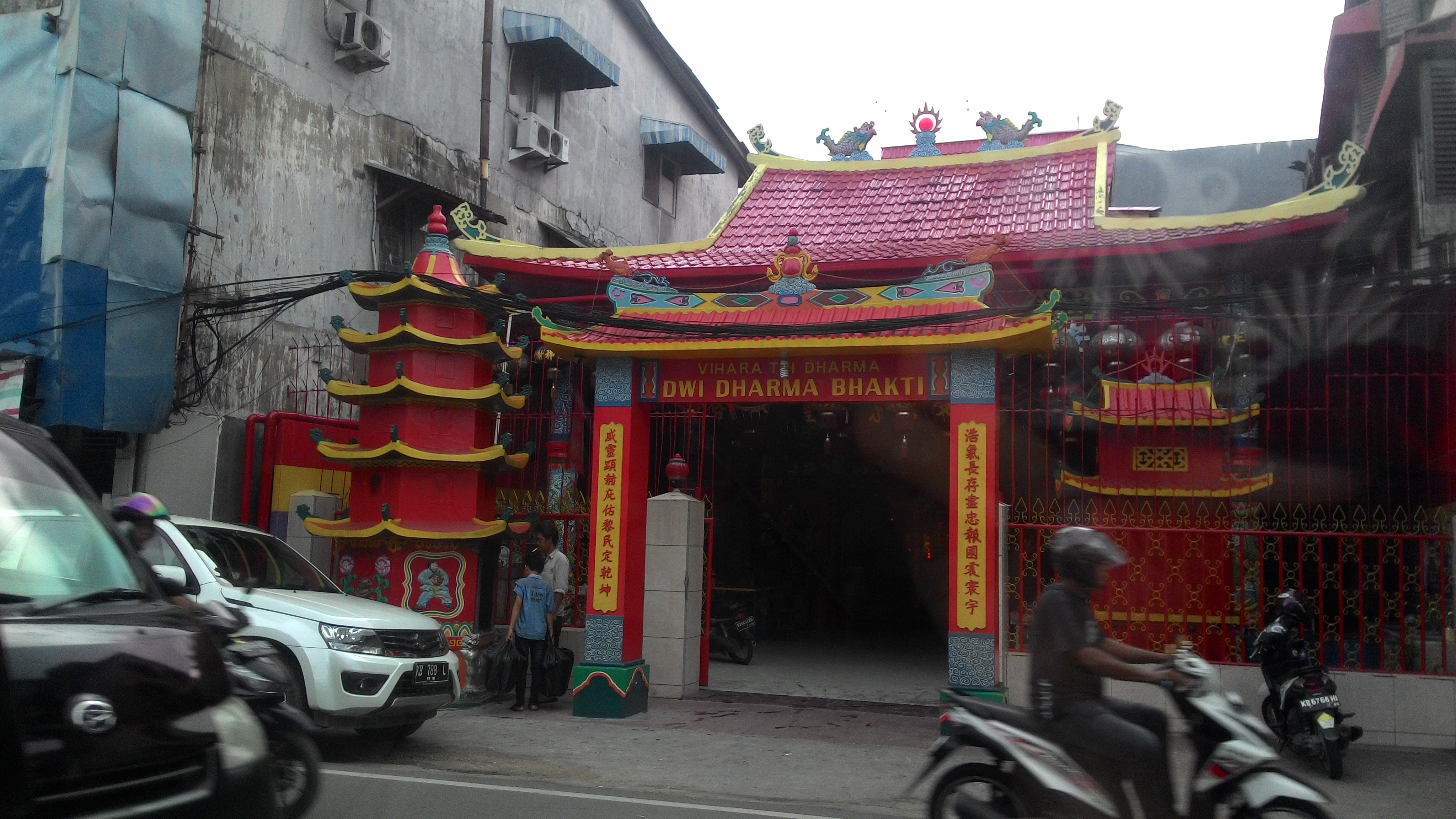 Terletak di tepi jalan utama Kota Pontianak, Vihara ini menjadi bukti keragaman etnis dan agama yang hidup di Pontianak.